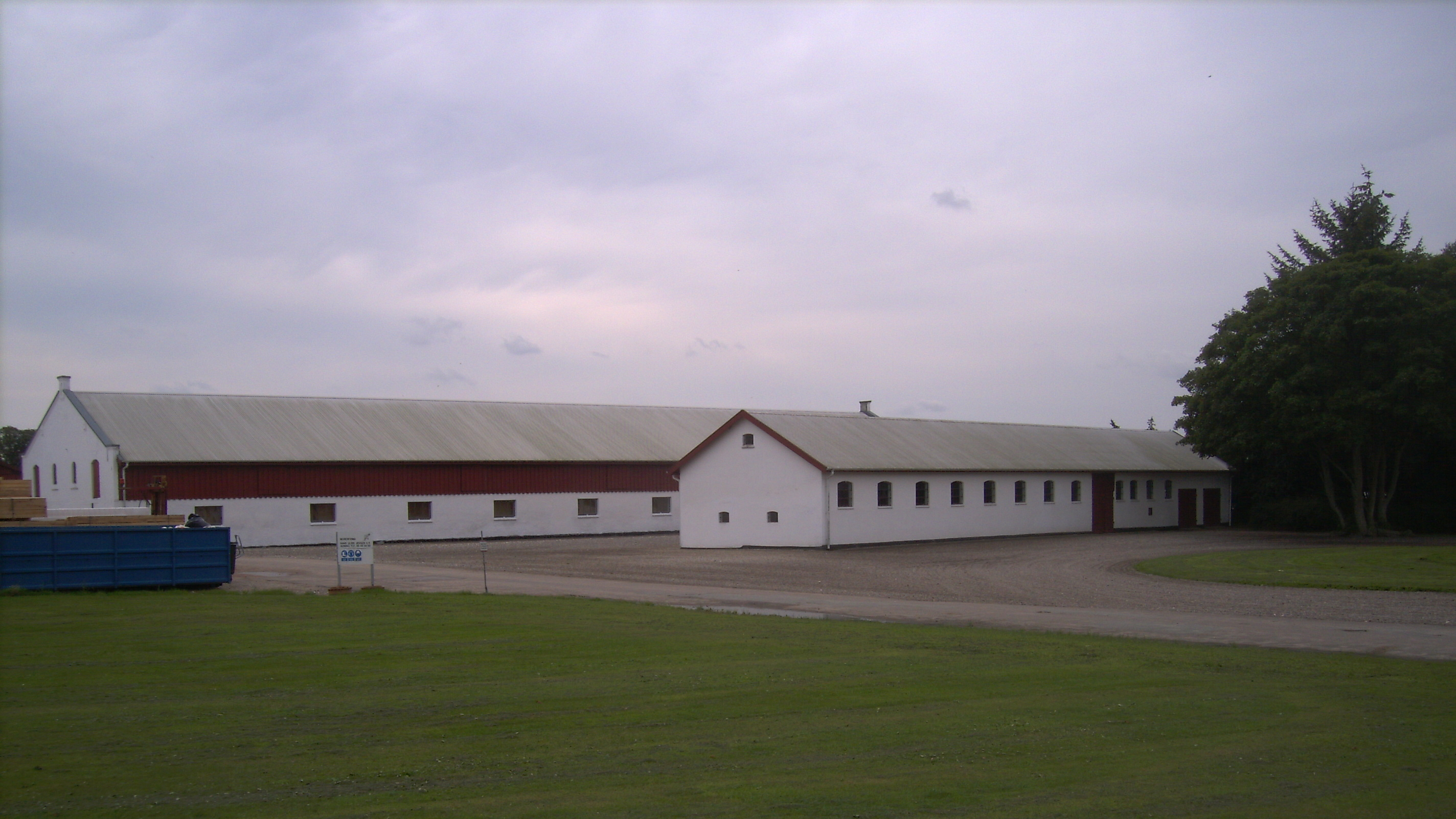 Stenalt, Ørsted Sogn,Rougsø Kommune, dele af avlsgården